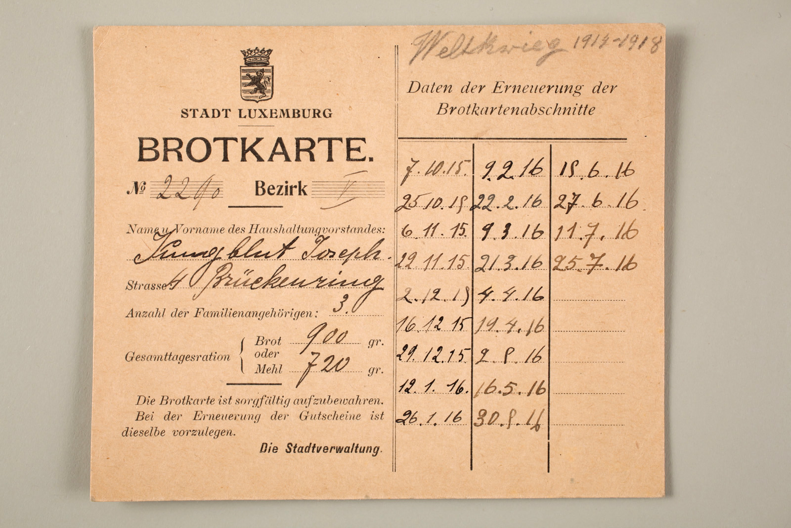 Eng Brotkarte vun der Stad Lëtzebuerg mat Inscriptoune vun 1915 an 1916.